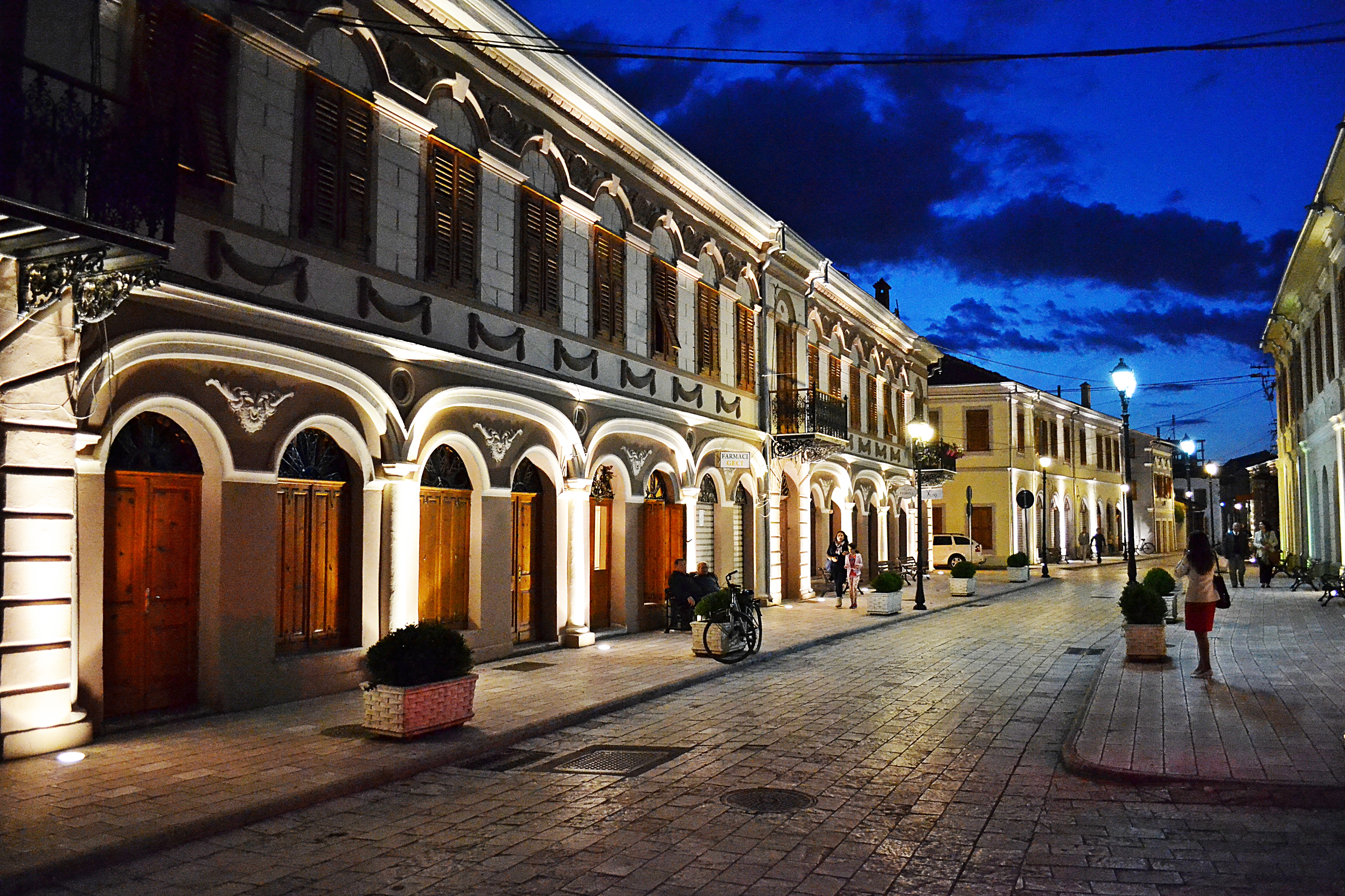 Zona Muze-Dhe Zona e Mbrojtur(1980)